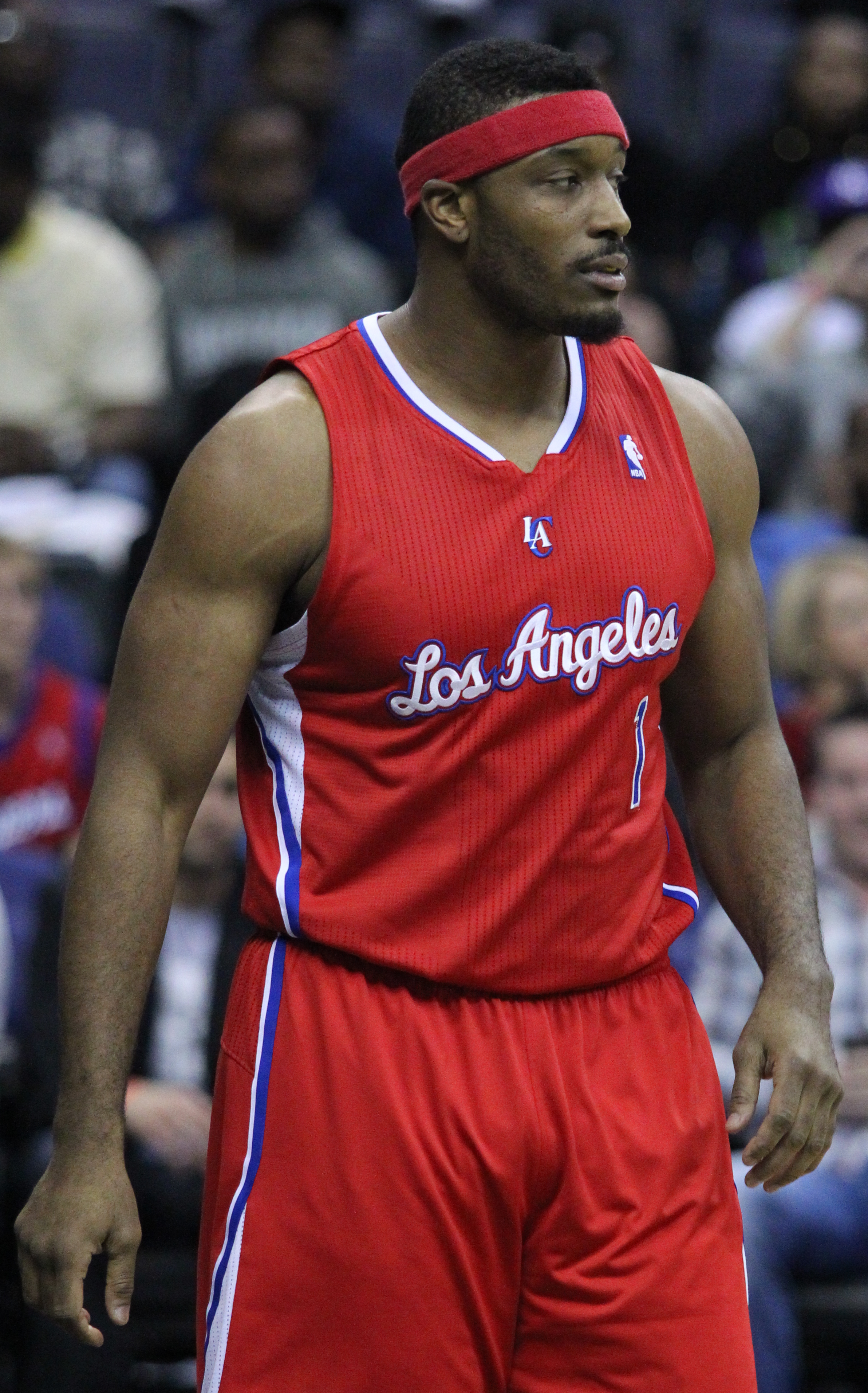 Wizards v/s Clippers 03/12/11